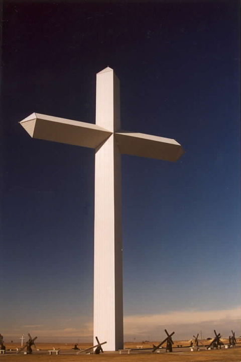 Croix géante et chemin de croix à sa base